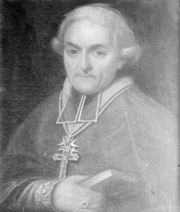 Portrait de Étienne Parfait Martin Morel de Mons